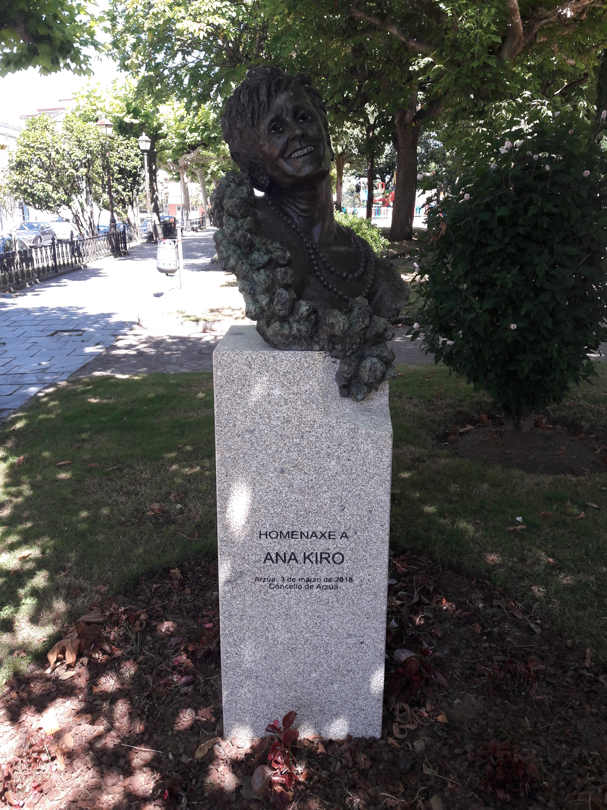 Monumento a Ana Kiro en Arzúa